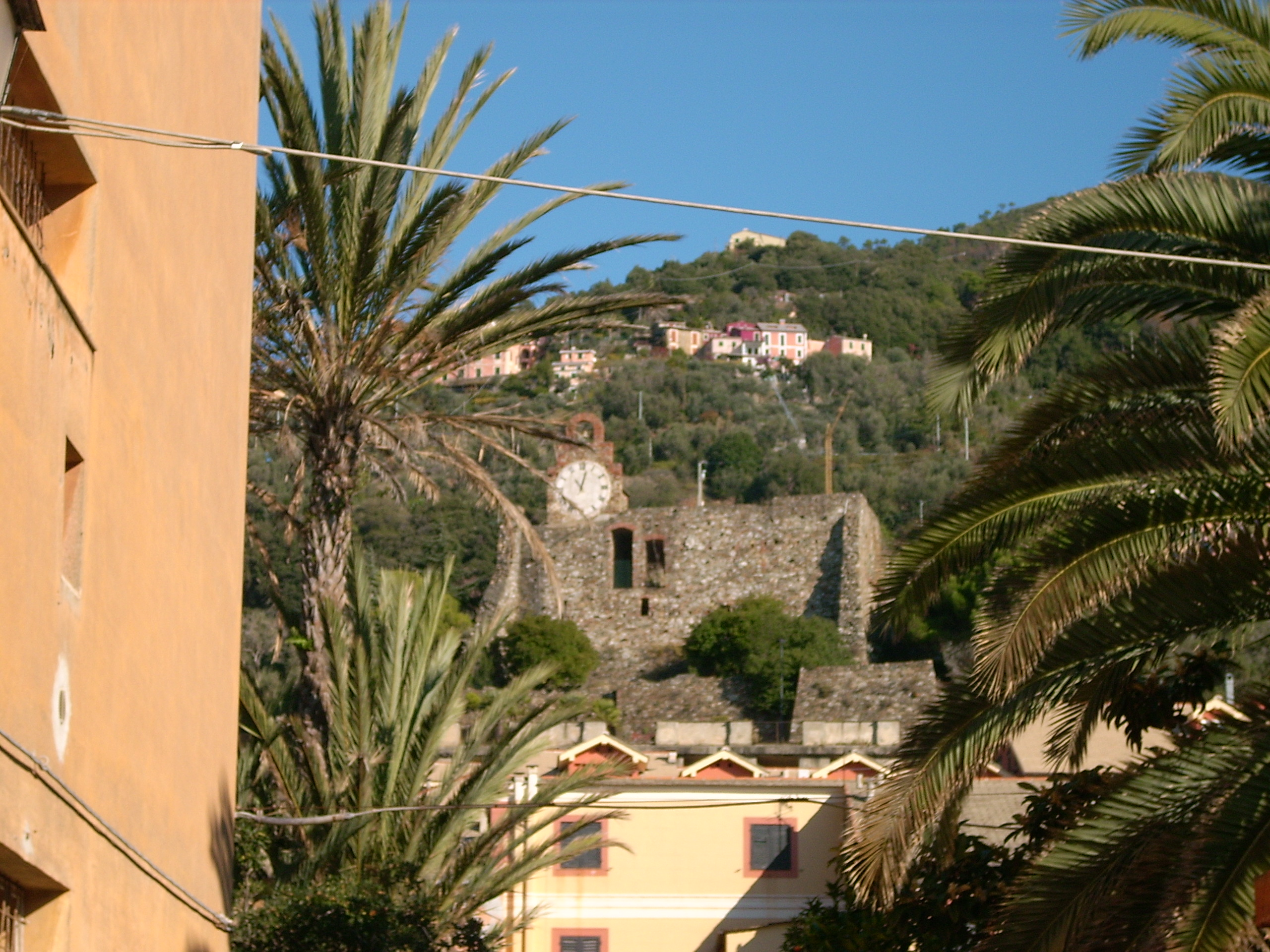 Bonassola, Liguria, Italia